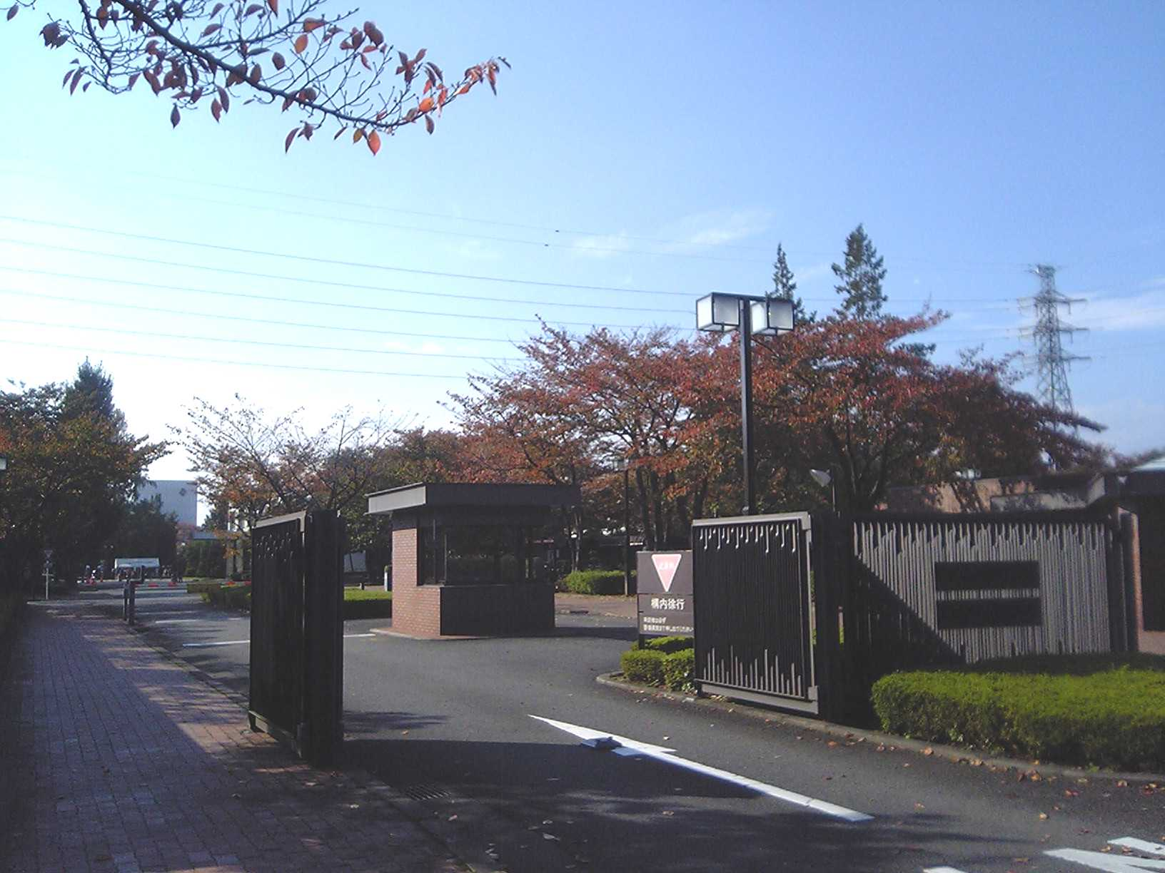 国立音楽大学（2007年11月4日投稿者が撮影）